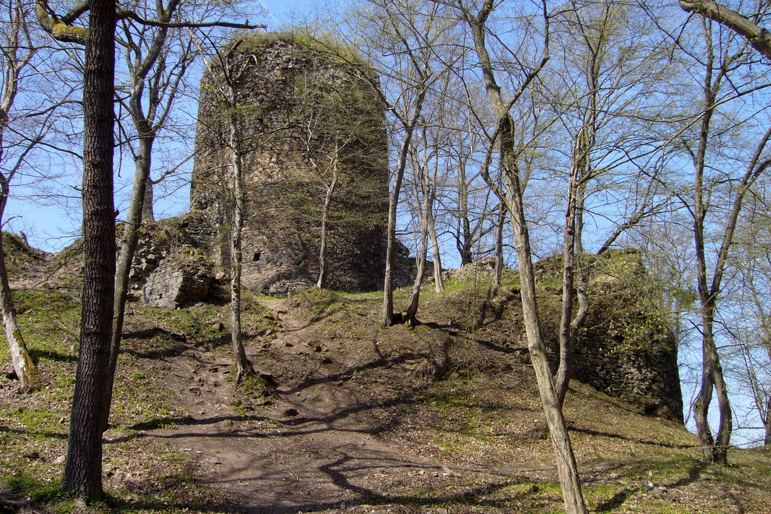 Bergfrit a prostor příhrádku, Hrad Týřov, Karlova Ves (okres Rakovník).